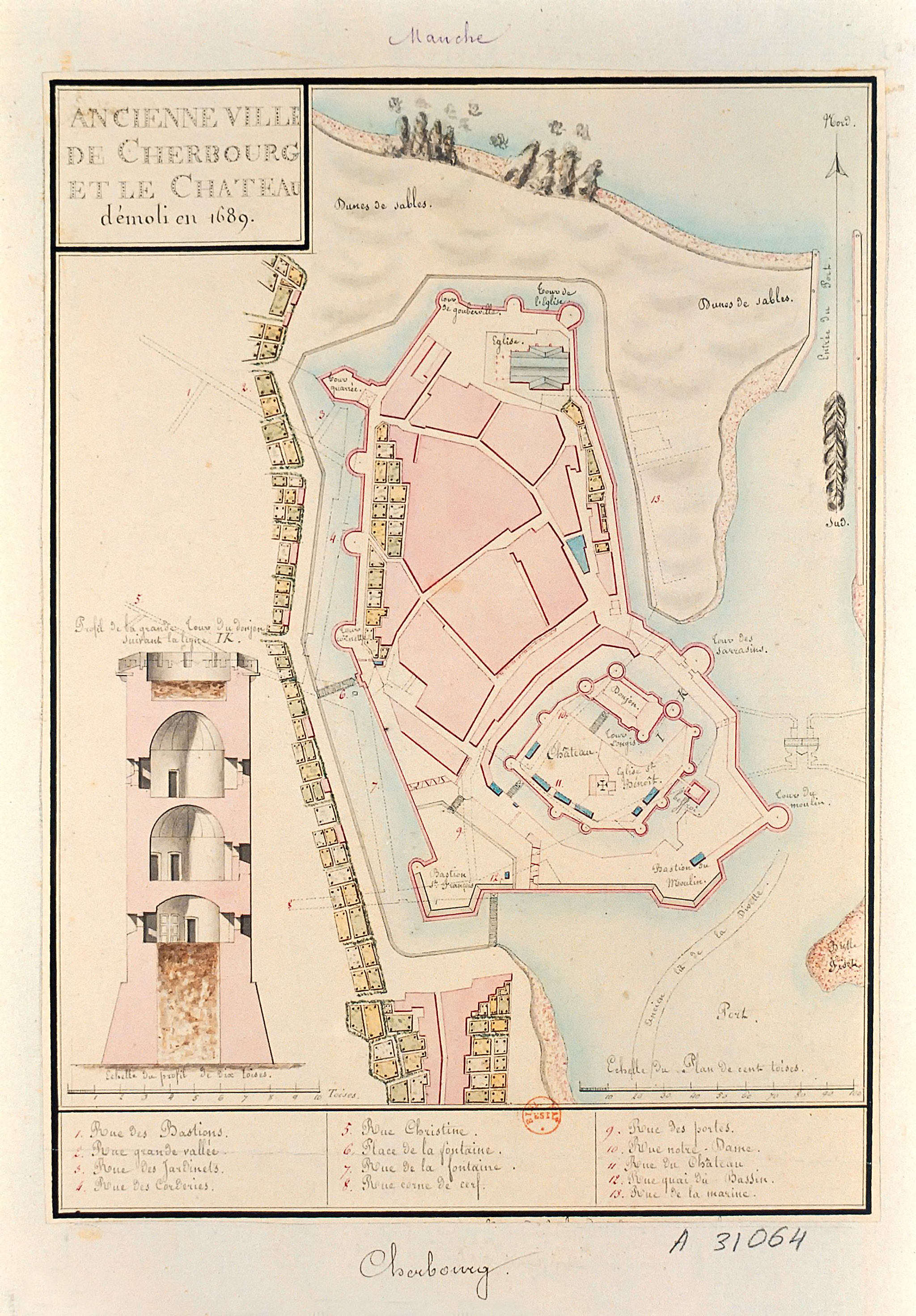 Ancienne ville de Cherbourg et le Chateau démoli en 1689